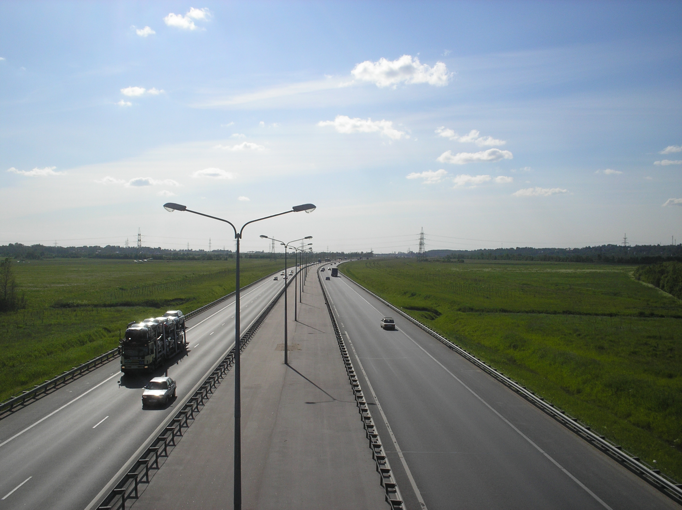 КАД (Санкт-Петербург)